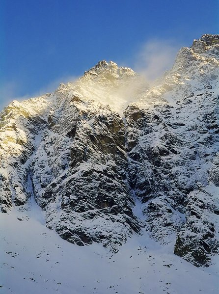 Zachodnia ściana Skrajnego Granata w zachodzącym słońcu. Doskonale widoczny nieco na prawo od centrum zdjęcia Komin Drege'a, przełamuje się wyżej w rozłożysty żleb, i w lekkim zachmurzeniu wyprowadza na Skrajną Sieczkową Przełączkę. Potężny, ponad ćwierćkilometrowy filar w centrum to tzw. "prawe żeberko" czyli prawe żebro zachodniej ściany Skrajnego Granata. Na lewo żleb Wójcika-Bracha.